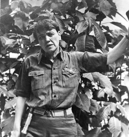 1939年艾格尼絲·史沫特萊由共产主义队伍派遣在中共中央在联合战线期间。